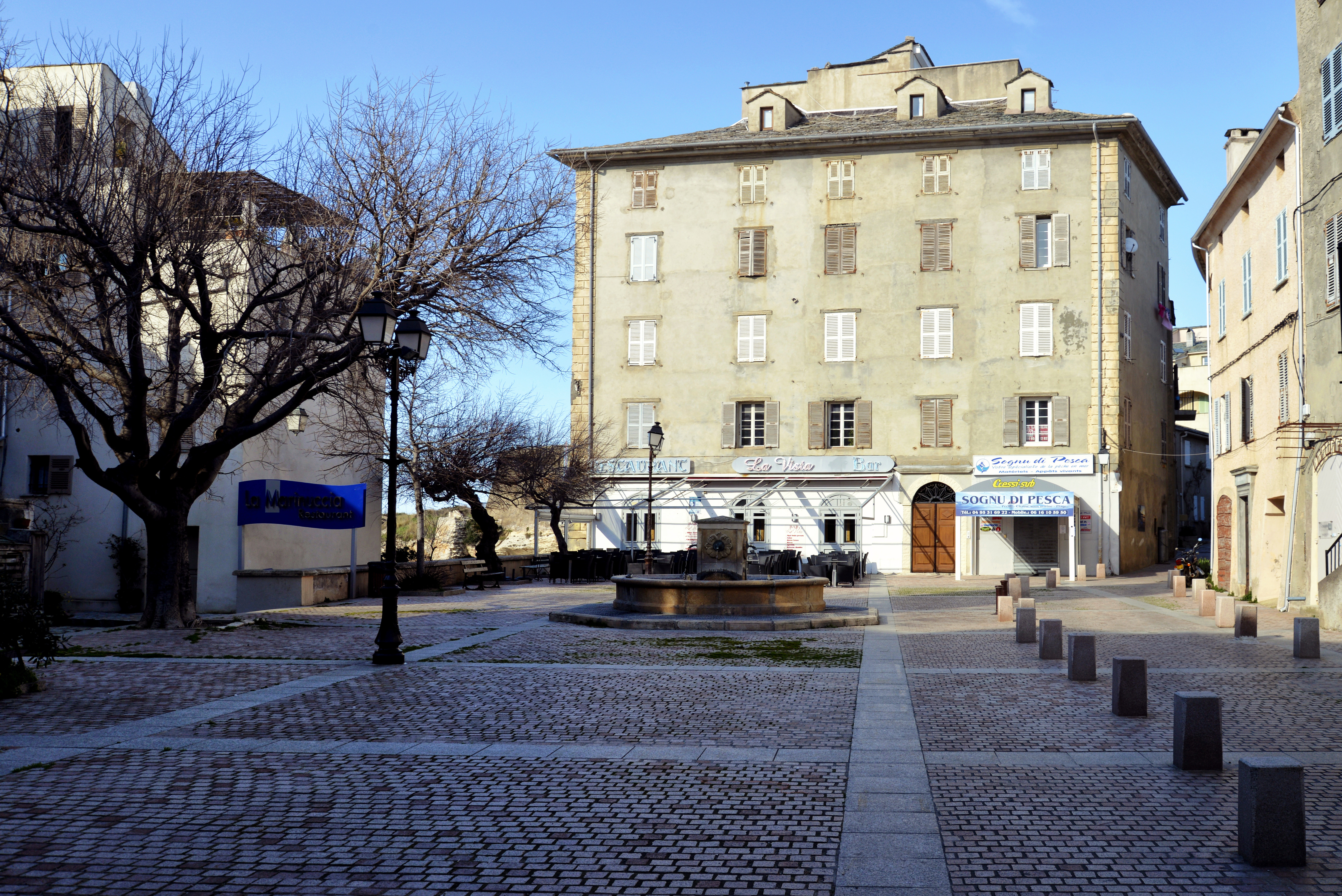 Saint-Florent, Nebbio (Corse) - Place Doria, entre port de plaisance et citadelle